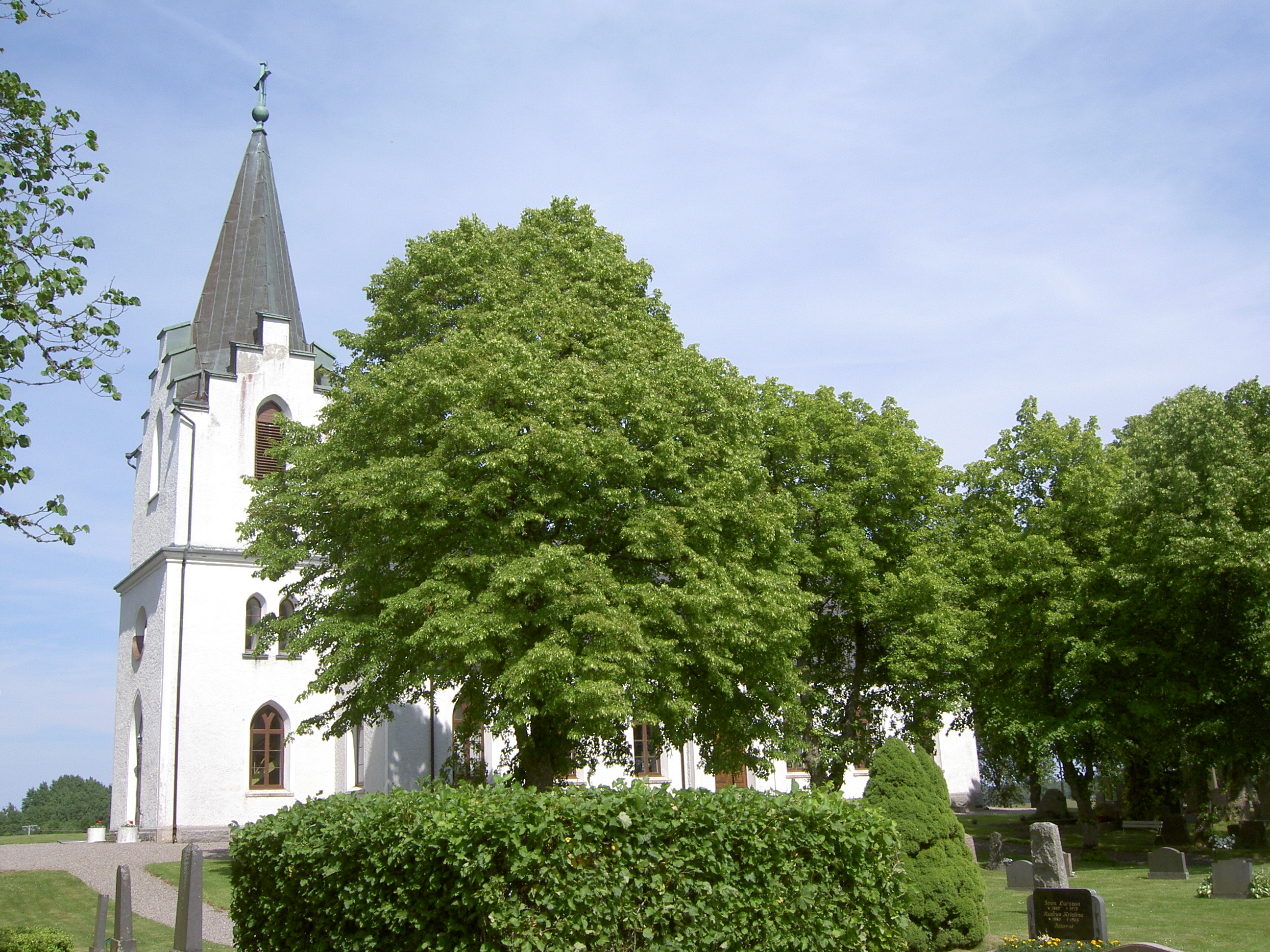 Erikstads kyrka